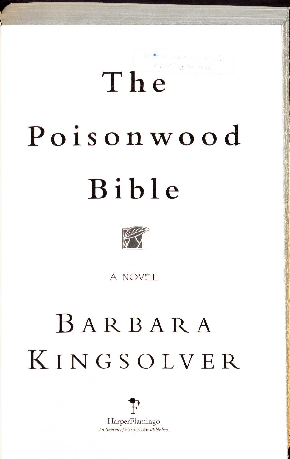 Barbara Kingsolver The Poisonwood Bible 1998 Title